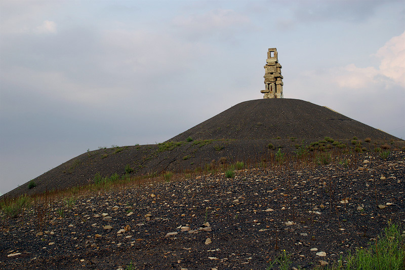 Skulptur "Himmelstreppe" auf einer Bergehalde auf dem Gelände der ehemaligen Zeche Rheinelbe in Gelsenkirchen-Ückendorf.)